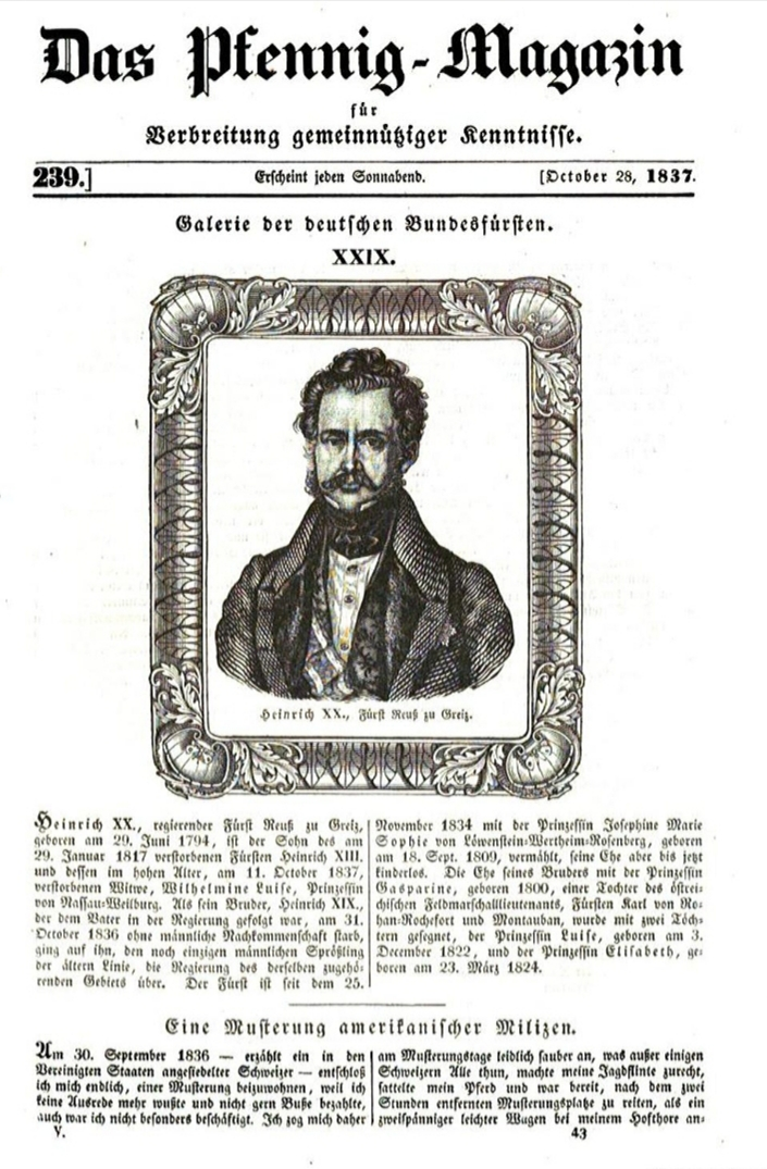 Zeitungsreportage von 1837 bezüglich der Vorstellung (Galerie) der deutschen Bundesfürsten, hier Heinrich XX., von Gottes Gnaden, älterer Linie souveräner Fürst Reuß, Graf und Herr von Plauen, Herr zu Greiz, Kranichfeld, Gera, Schleiz und Lobenstein etc. etc. und seiner Gattin, Prinzessin Sophie von Löwenstein-Wertheim-Rosenberg